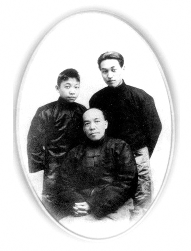 Лян Цичао с сыновьями: старшим Лян Сыюном (梁思永) и младшим Лян Сыдой (梁思达)